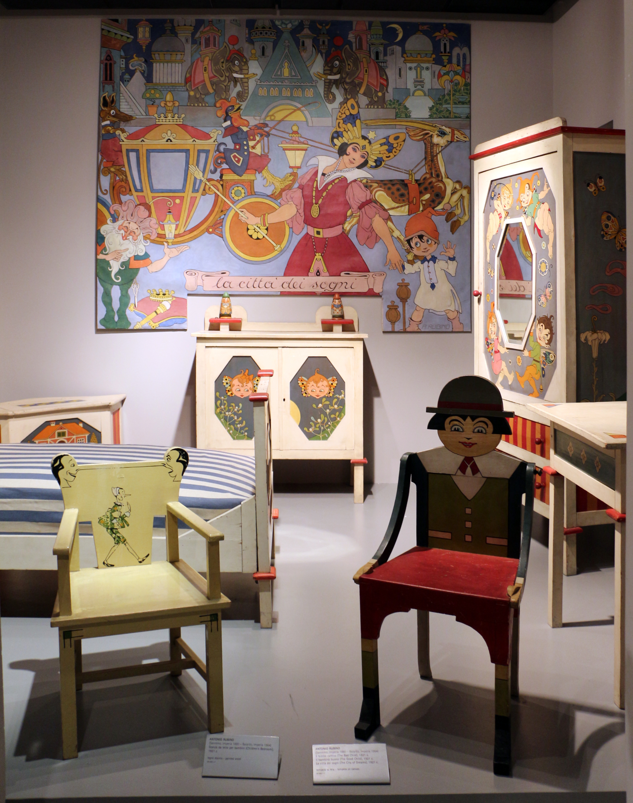 Il parco e i musei di Nervi This is a photo of a monument which is part of cultural heritage of Italy.